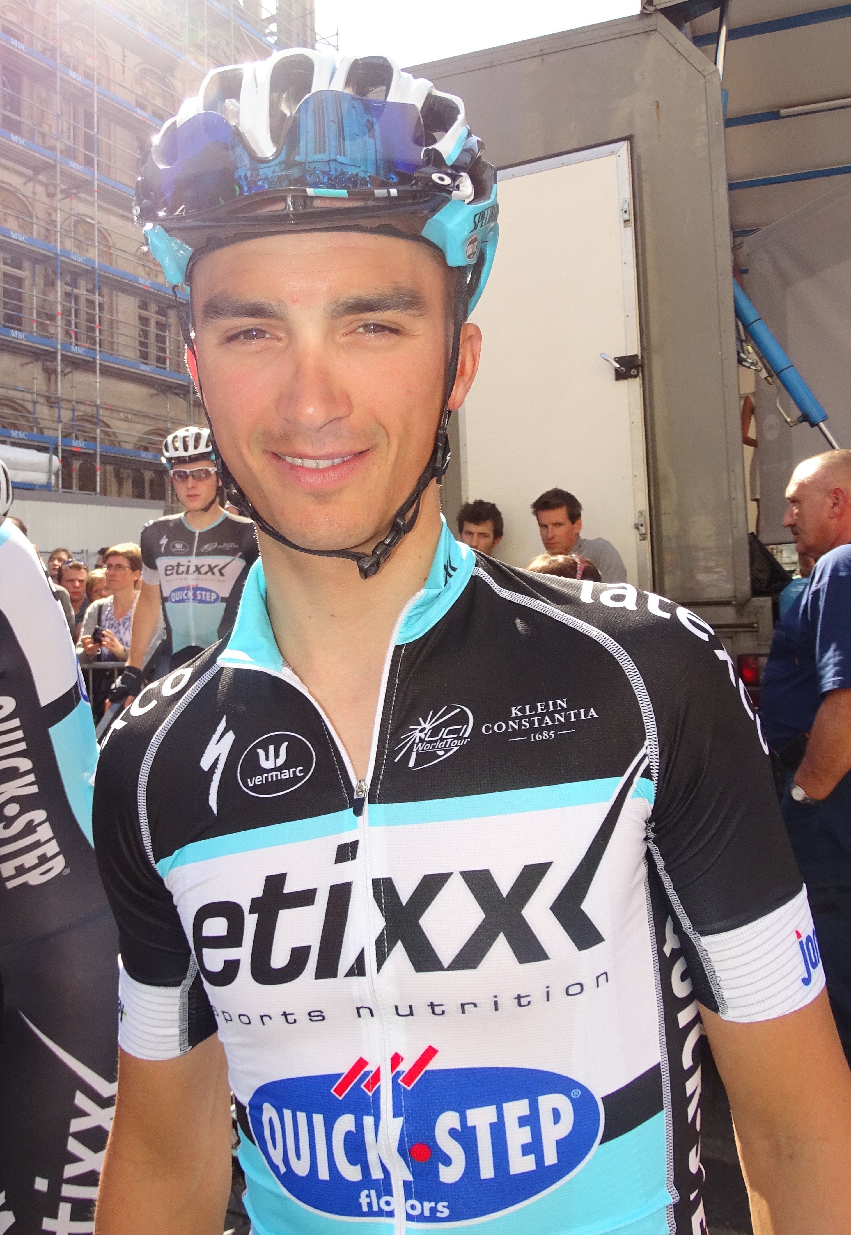 Reportage réalisé le mercredi 15 avril à l'occasion du départ de la Flèche brabançonne 2015 à Louvain, Belgique.